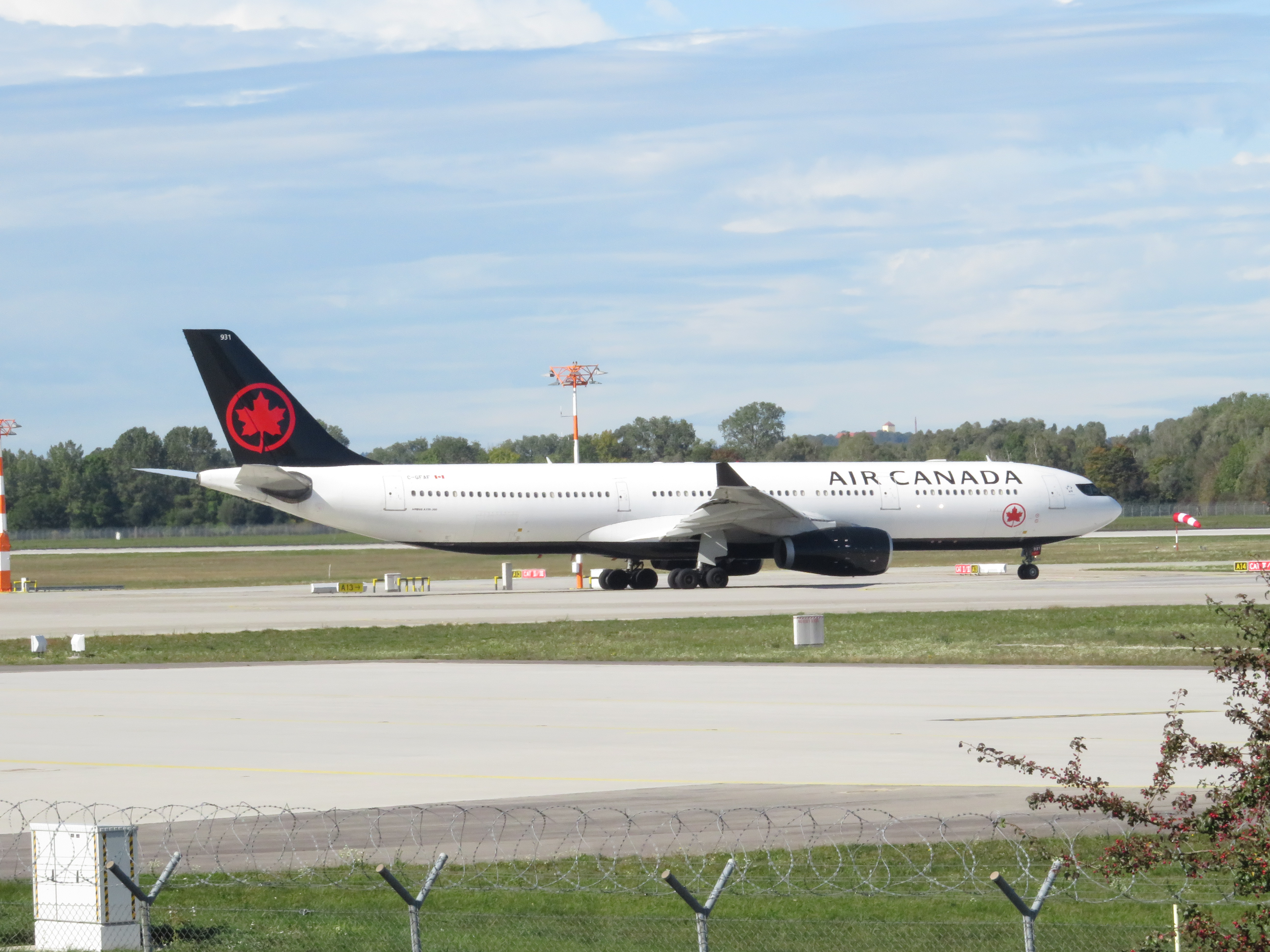 Air Canada A330-300 C-GFAF 2019-10-01 Munich Airport Airbus A330-343 cn/serial number: 277